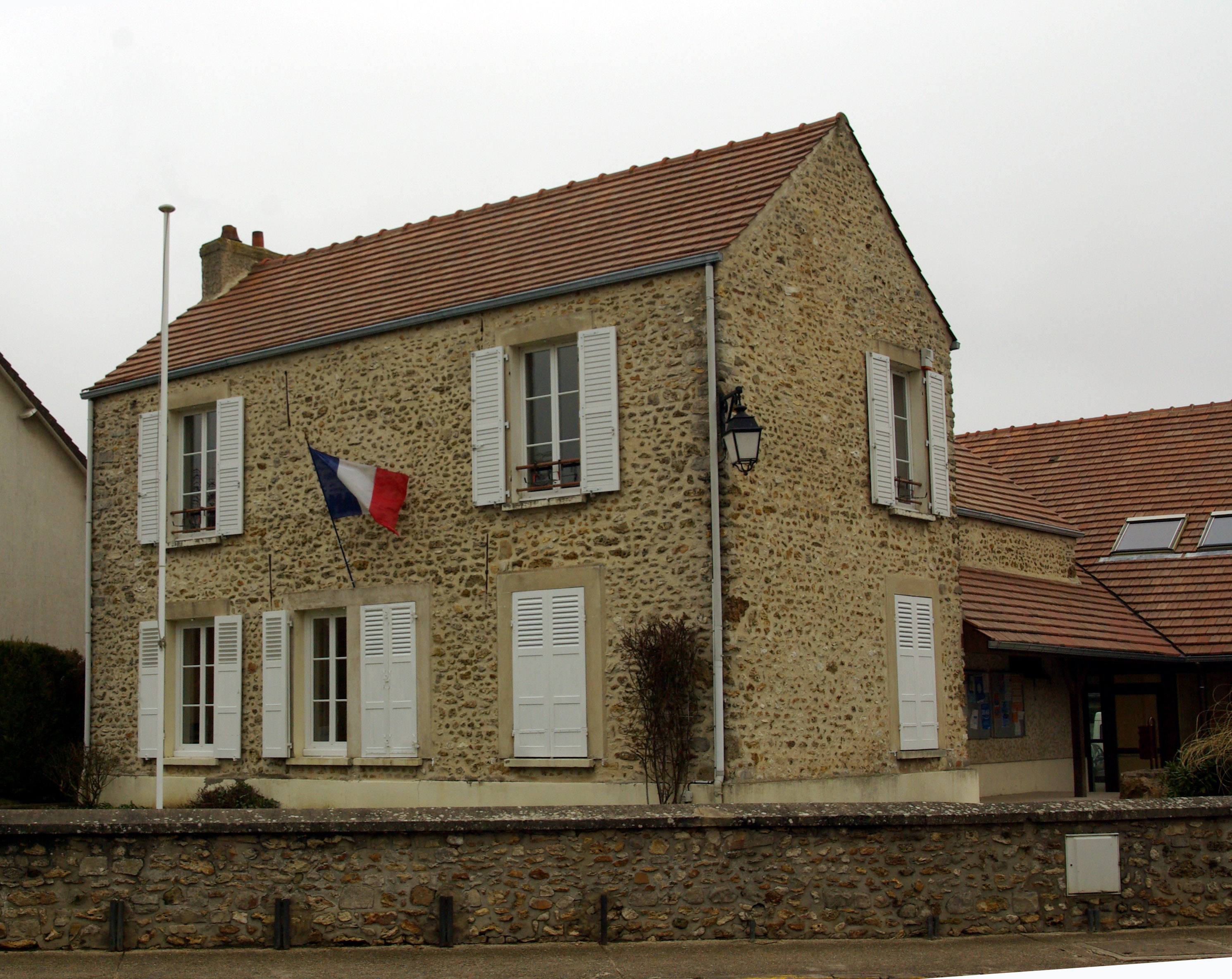 Mairie de Mauchamps